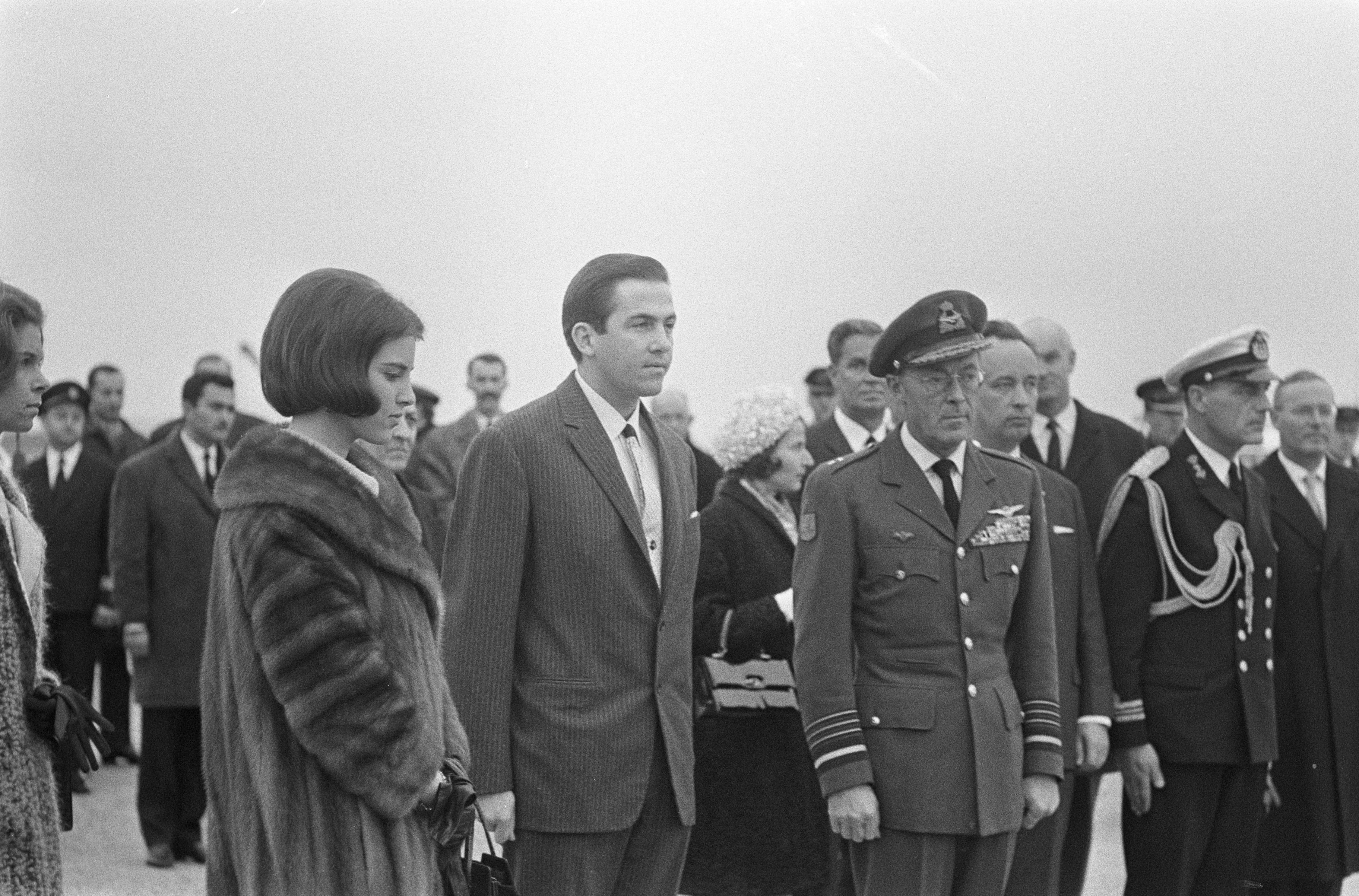 Collectie / Archief : Fotocollectie Anefo Reportage / Serie : [ onbekend ] Beschrijving : Aankomst Grieks Koninklijk paar op Schiphol Datum : 7 maart 1966 Trefwoorden : aankomsten Fotograaf : Koch, Eric / Anefo Auteursrechthebbende : Nationaal Archief Materiaalsoort : Negatief (zwart/wit) Nummer archiefinventaris : bekijk toegang 2.24.01.05 Bestanddeelnummer : 918-8596